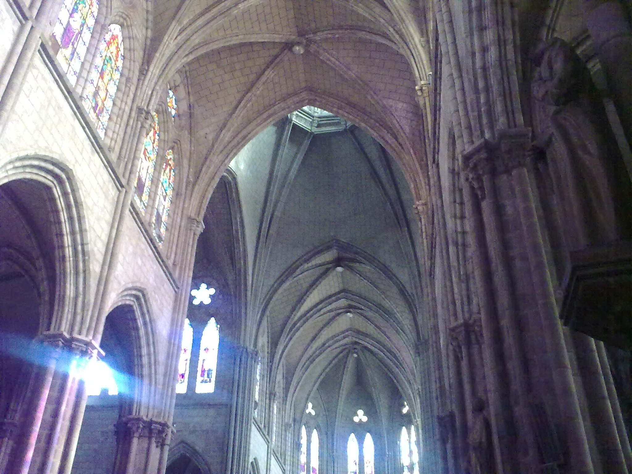 Interior de la Magnífica Catedral de Quito.